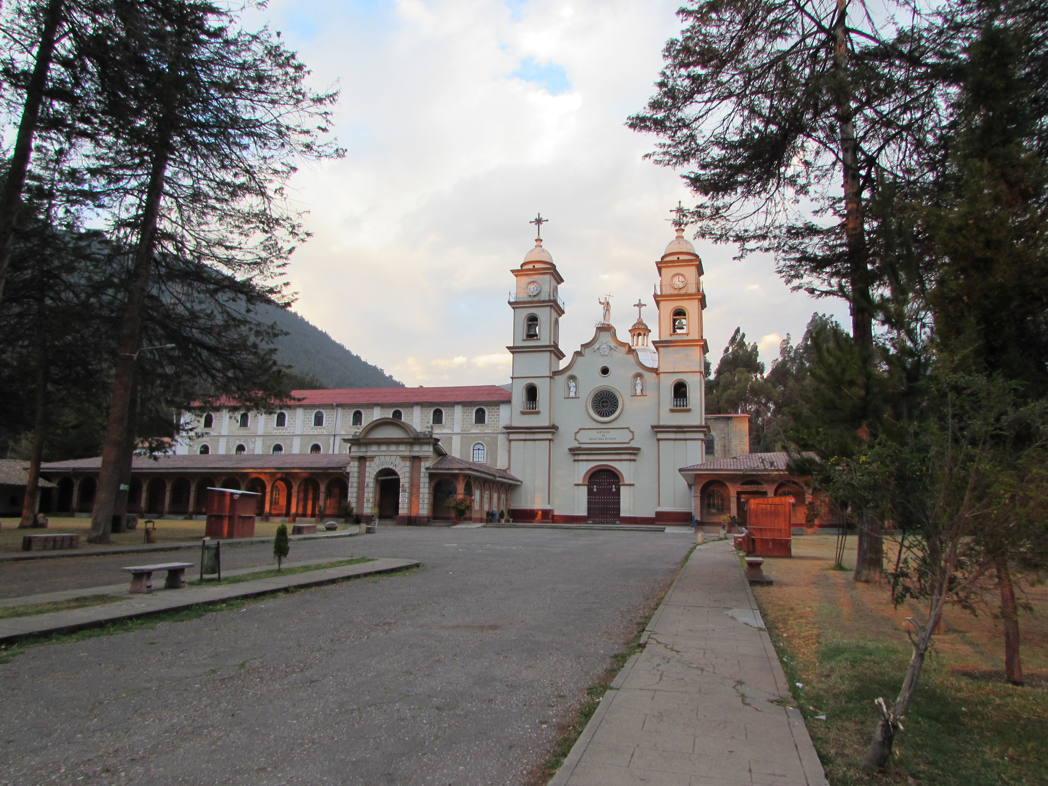 Convento de Santa Rosa de Ocopa, Concepción, Junín - Perú